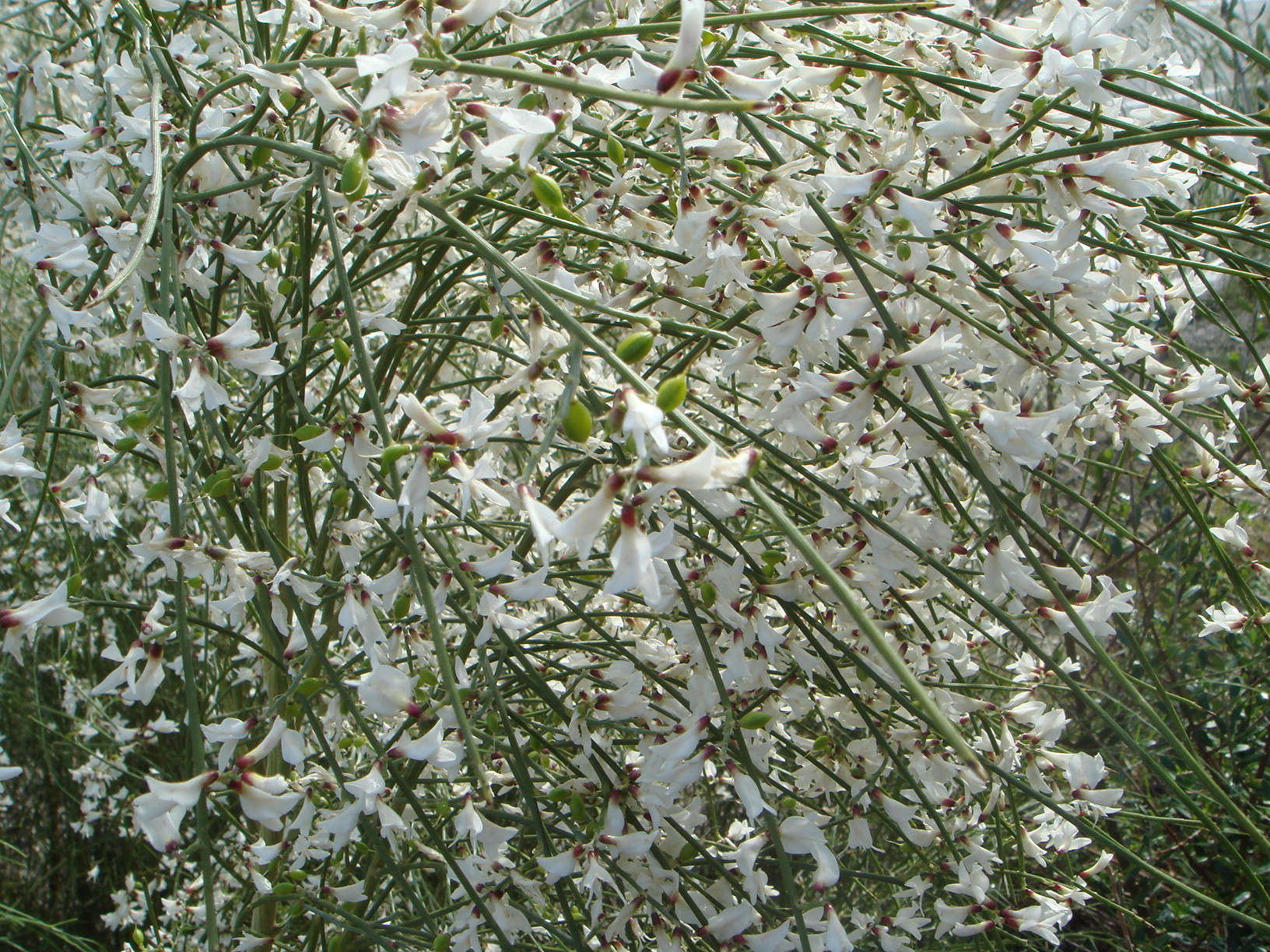 Retama monosperma, El Bosque, Cádiz, España